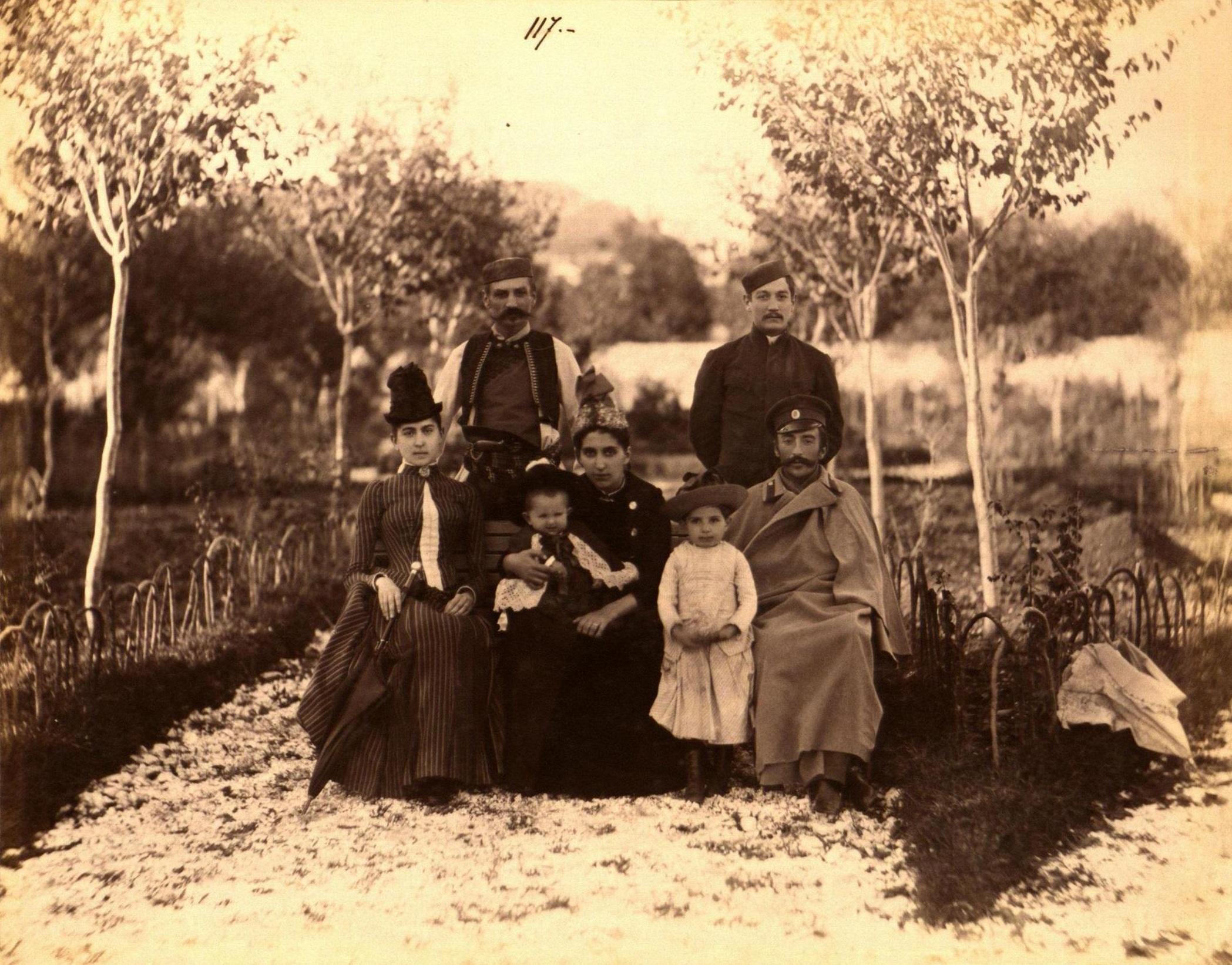 Сликано око 1890. године. фотограф непознат.